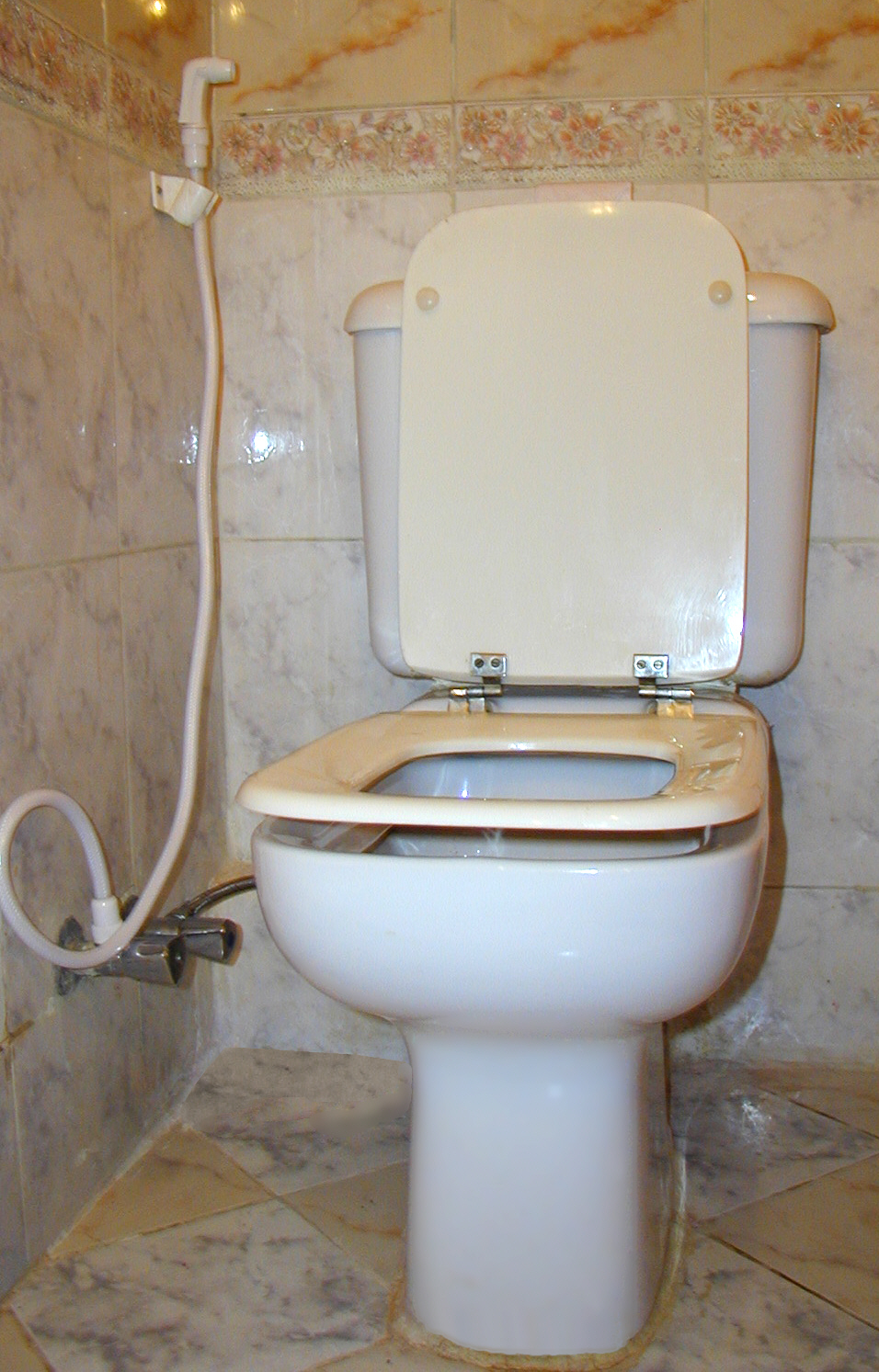 Urządzenie do opłukiwania przy typowej muszli klozetowej